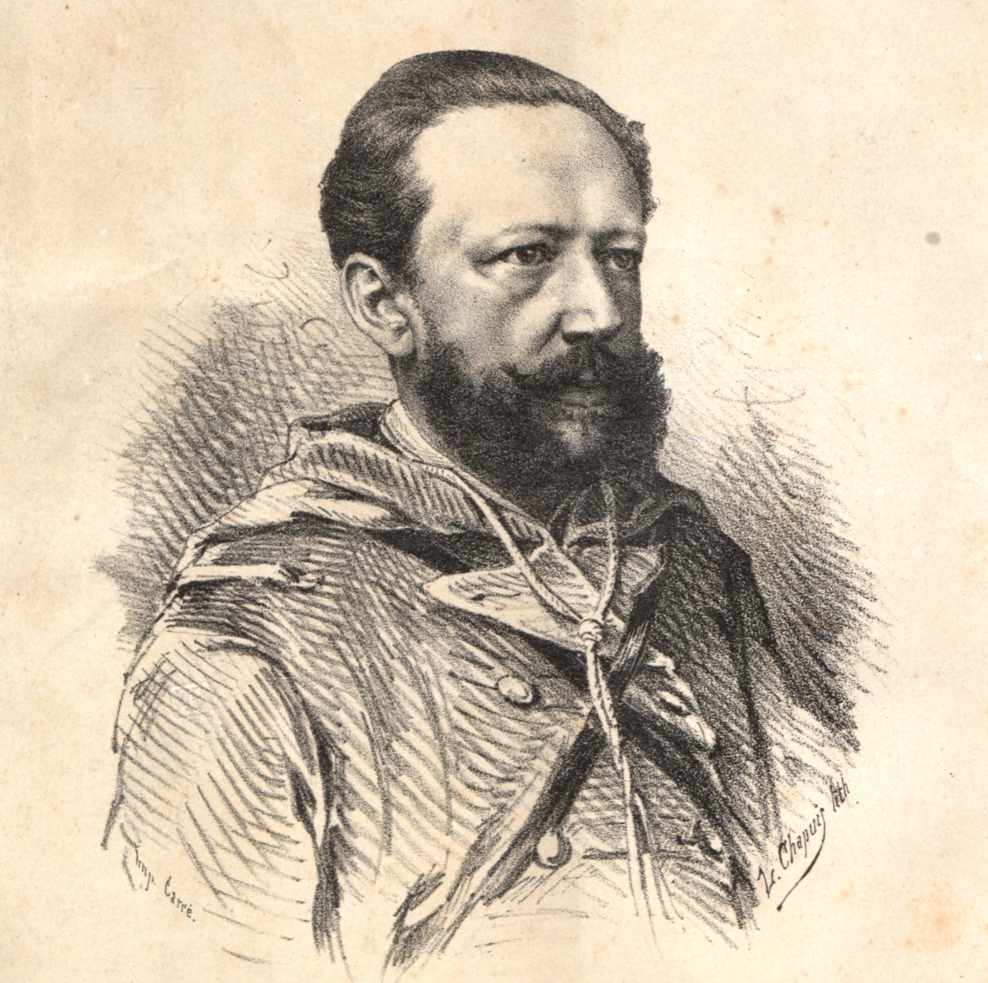 Powstanie Styczniowe ( January Uprising 1863 ) - gen Józef Hauke ("Bosak")